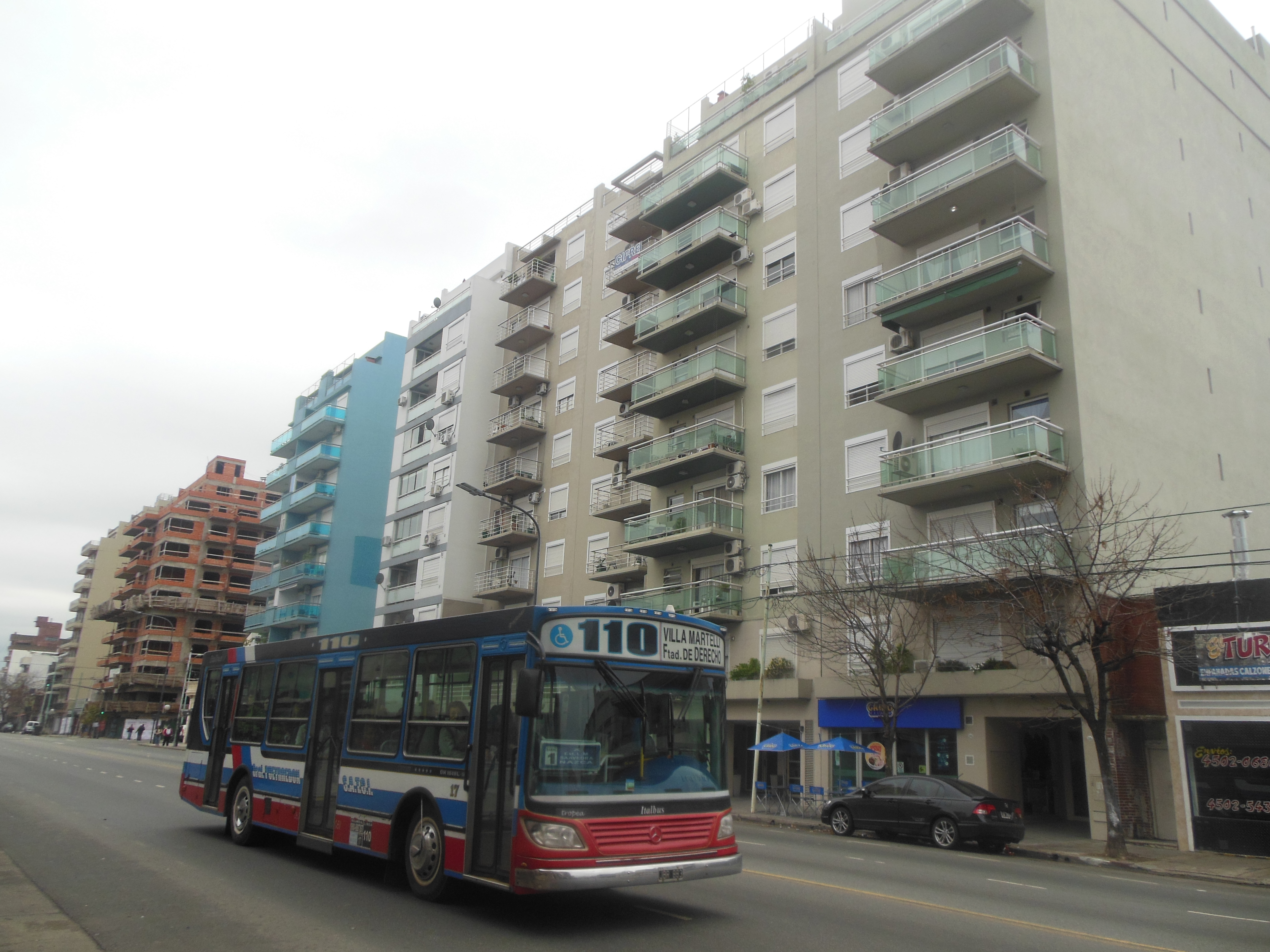 Cerca del cruce con el F.C. San Martín